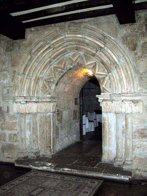 Portada románica iglesia de Cenera de Zalima, anegada por el Pantano de Aguilar que se conserva en el castillo de Monzón de Campor, Palencia, España